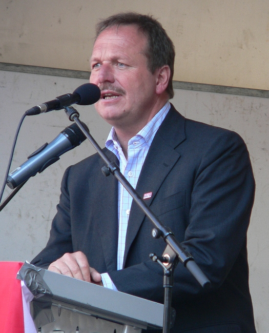 Frank Bsirske, ver.di (Rede auf dem Gänsemarkt Hamburg 2006-05-09)